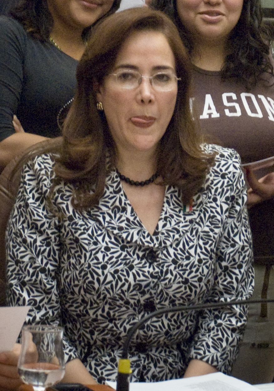 La Senadora Yeidckol Polevnsky me sacó la lengua... O_o ¡Cámara Yeicol! --- (Nah, en realidad se estaba remojando los labios. Pero se me hizo un buen ejemplo de cómo una foto en el momento exacto puede cambiar la "realidá".) Me gustó esta foto porque pareciese que todo es felicidad.